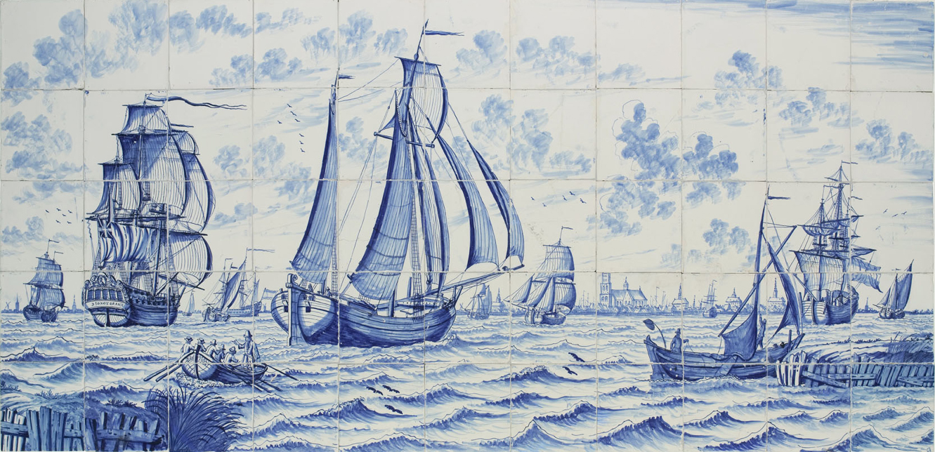 Tegeltableau met op het midden afgebeeld het kofschip "De Twee Gebroeders" van Hylke Jans Kingma (1708-1782), die zelf ook, staande in de sloep, als koopman is afgebeeld